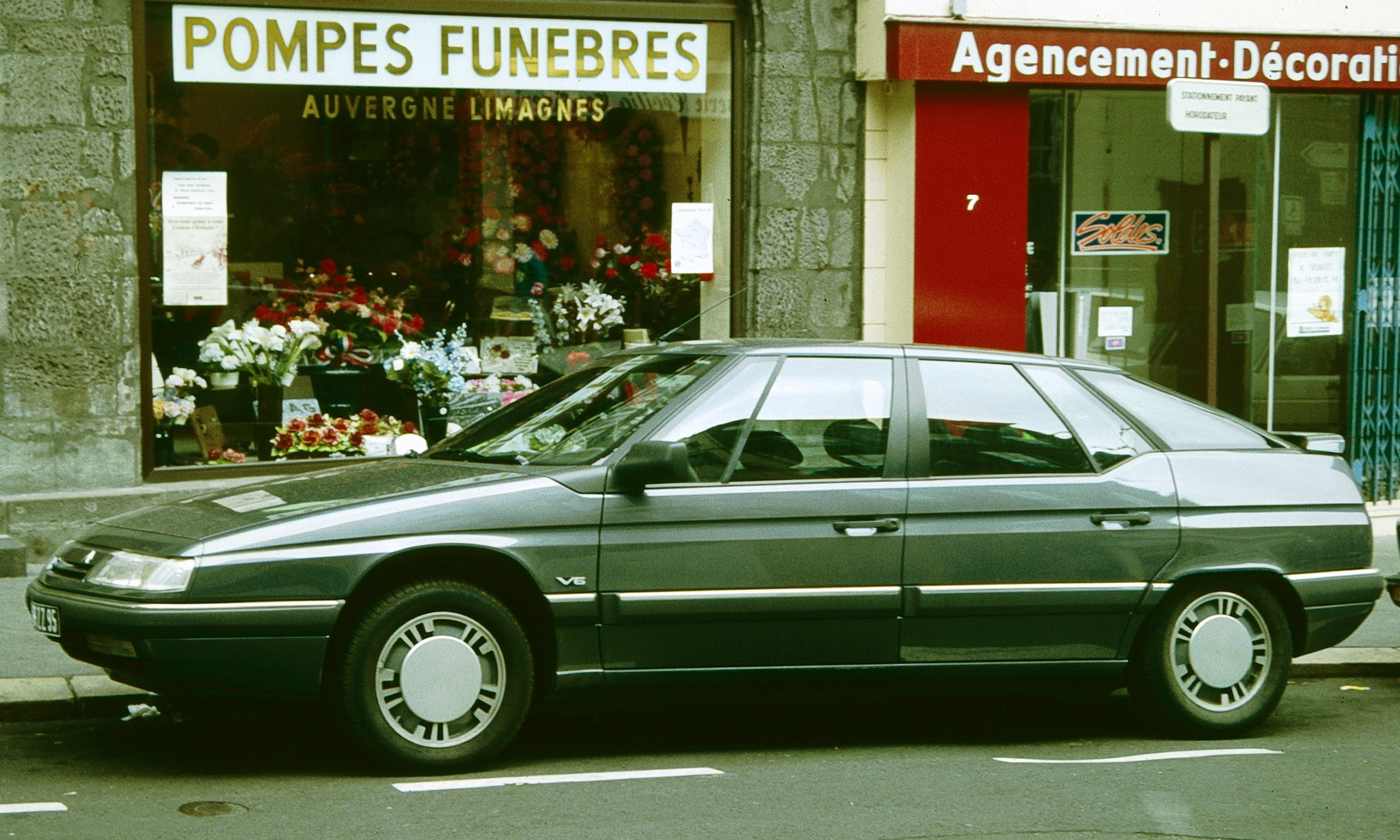 Citroen XM V6 outside funeral parlour